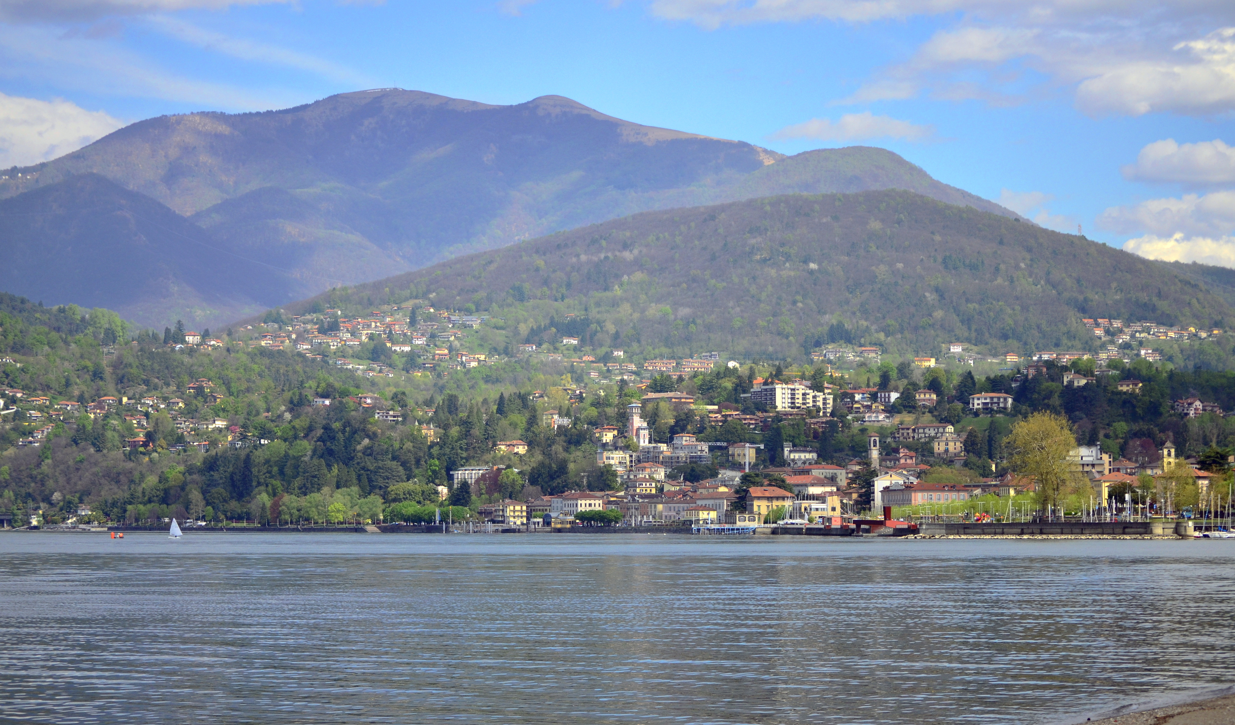 Lago Maggiore